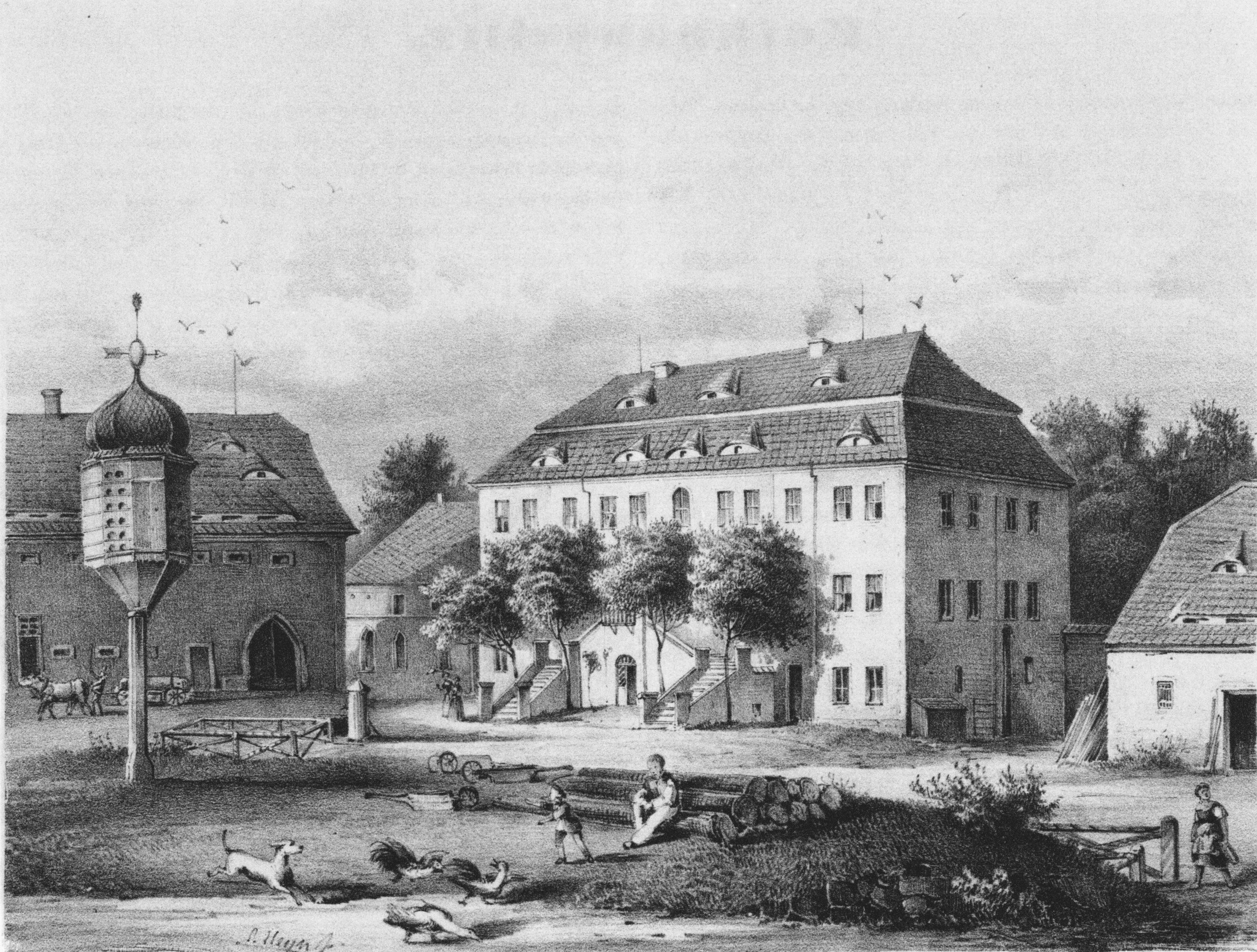 Roth - Nausslitz aus: Album der Rittergüter und Schlösser im Königreiche Sachsen Markgrafenthum Oberlausitz Section: III